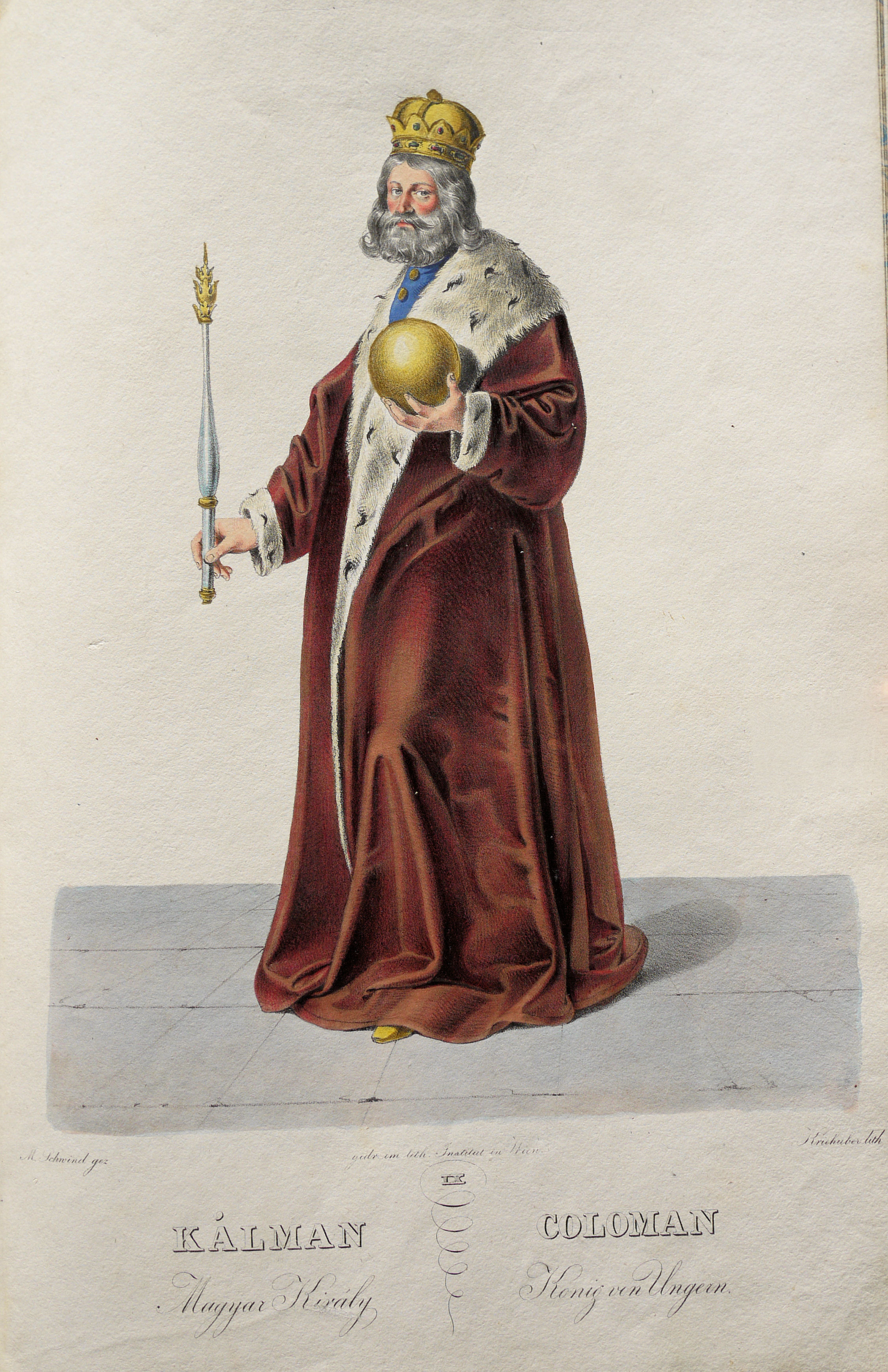 Koloman (1070-1116), König von Ungarn. Lithographie von Josef Kriehuber nach einer Zeichnung von Moritz von Schwind aus Ungerns Erste Heerführer Herzoge und Koenige In einer Reihe von Bildnissen von Bela bis auf Seine Majestät Franz I. Kaiser Von Österreich König Von Ungern &c., &c. Wien : Lithographisches Institut ;ca. 1828